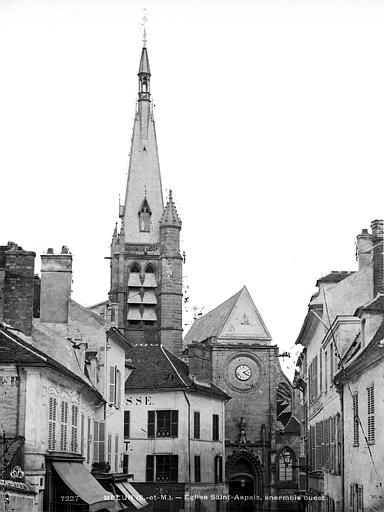 Façade ouest